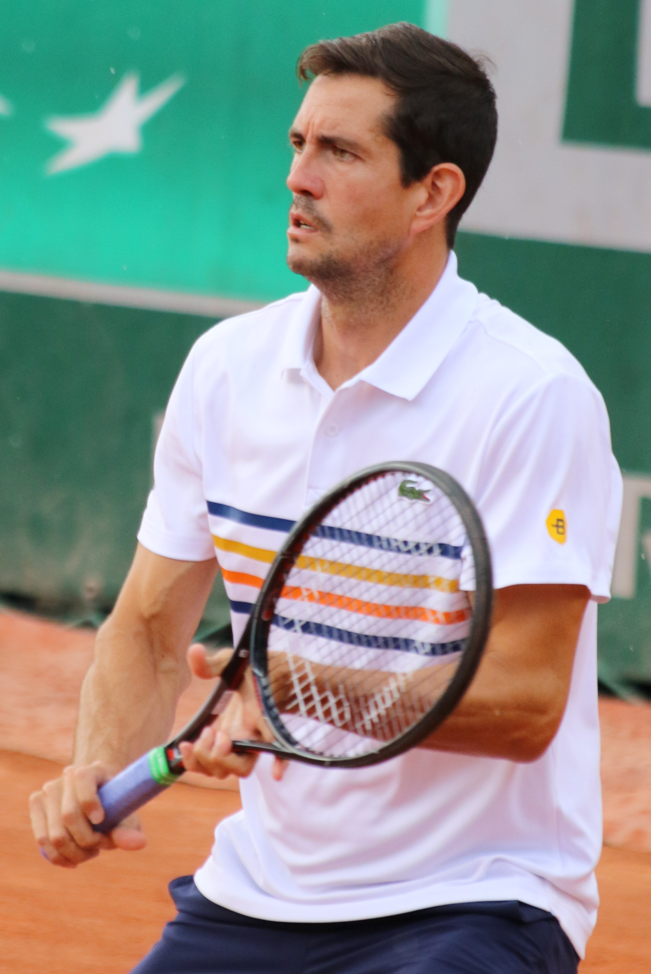 Garcia Lopez RG18 (8)